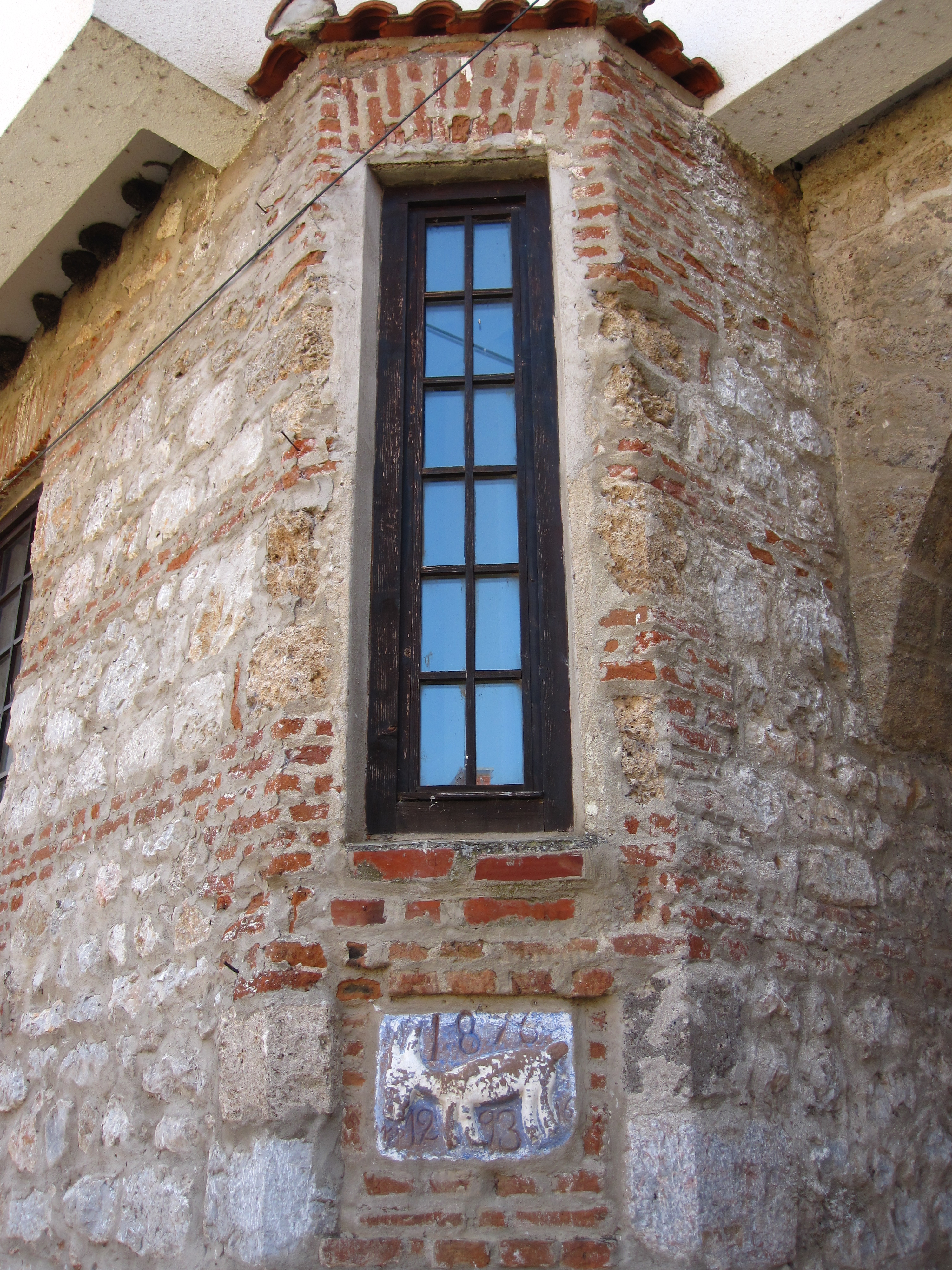 Прозорец и дел од архитектурата на манастирот “Св.Наум” - Охрид.